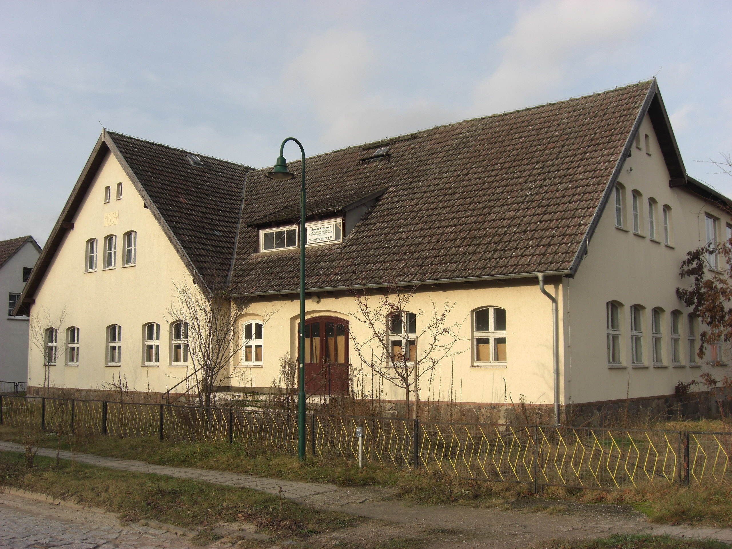 Die ehemalige Schule von Warthe. (2011 zum Verkauf stehend)